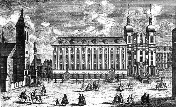 Olomouc. Jezuitská kolej a kostel P. Marie Sněžné